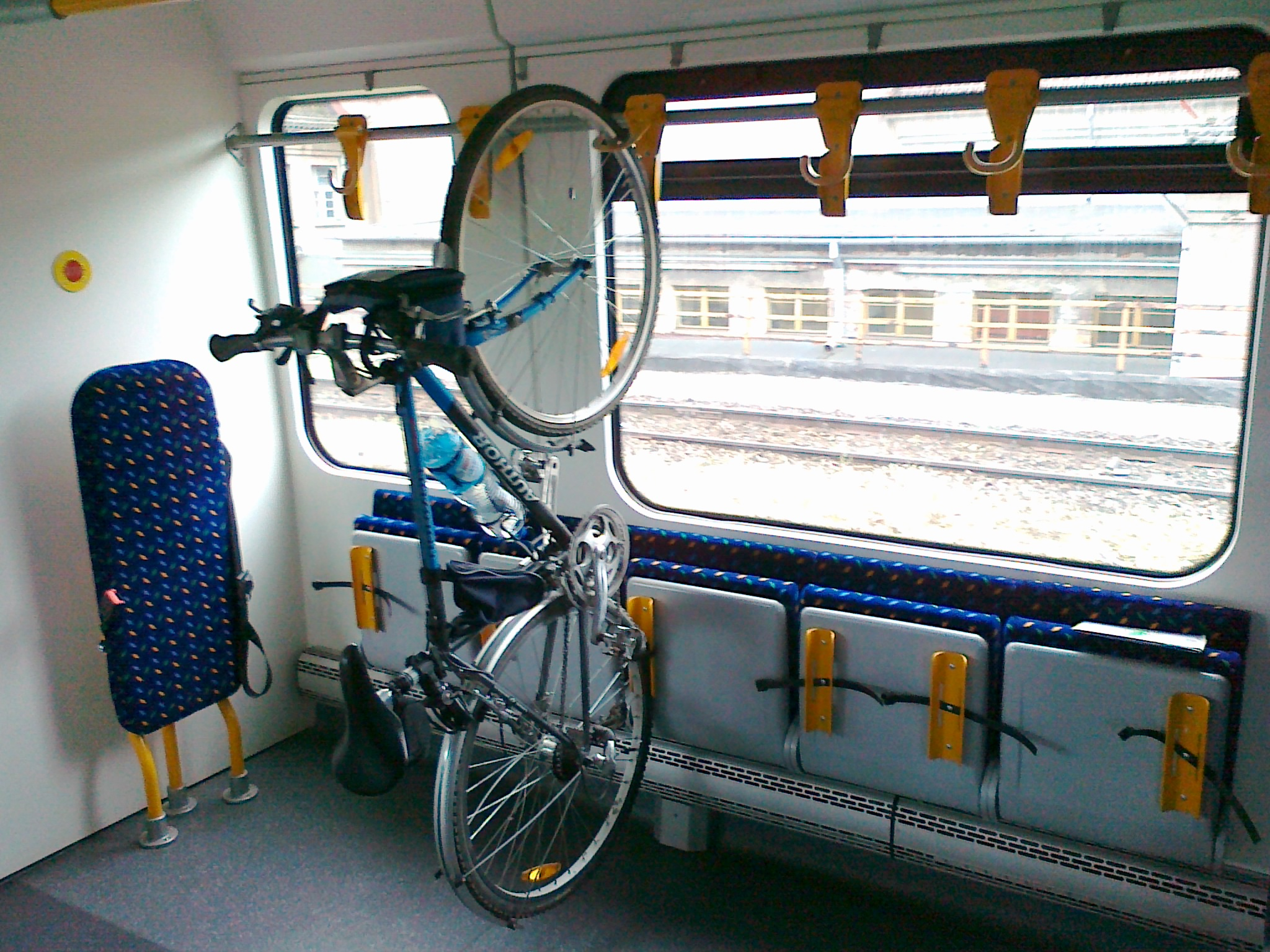 SA138-005 przestrzeń wielofunkcyjna